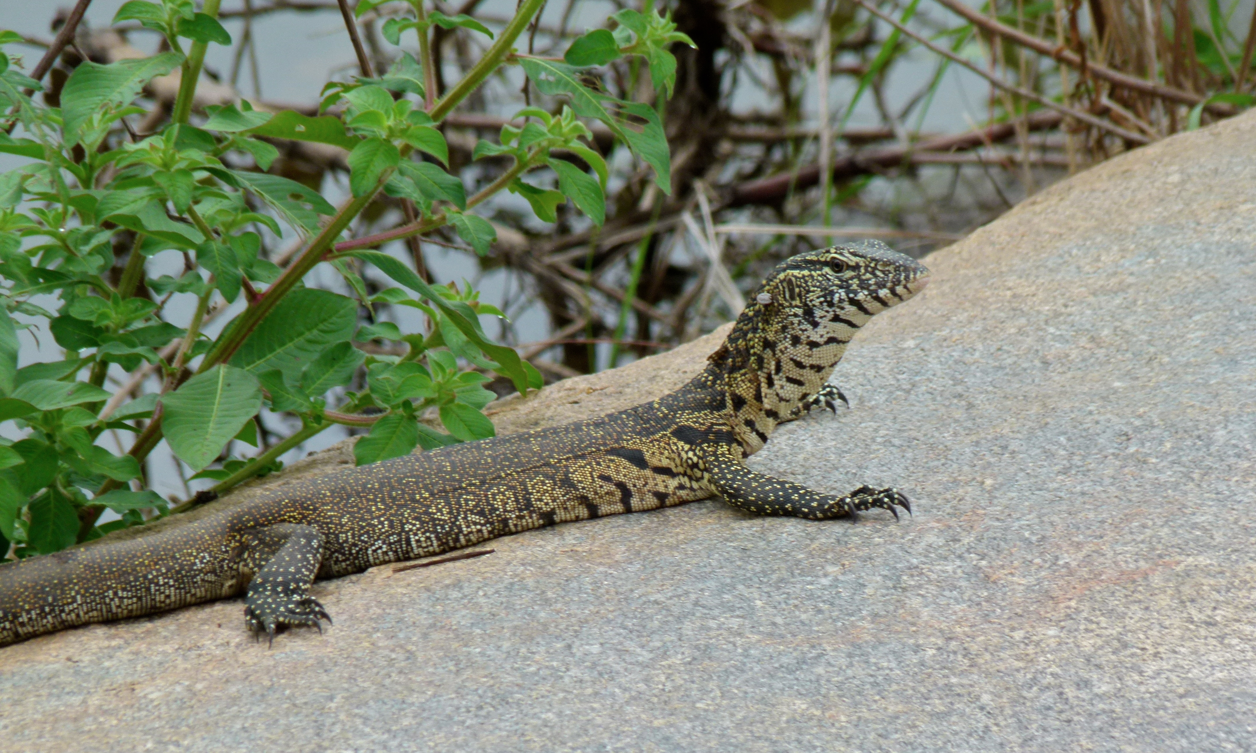 S83 near Skukuza, Kruger NP, SOUTH AFRICA